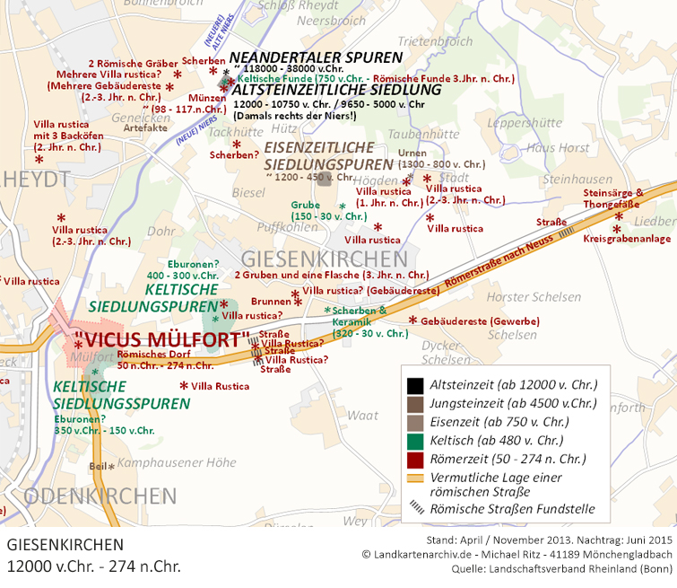 Historische Spuren des Neandertalers, Kelten und Römers in Mönchengladbach-Giesenkirchen und östlichen Mönchengladbach-Rheydt